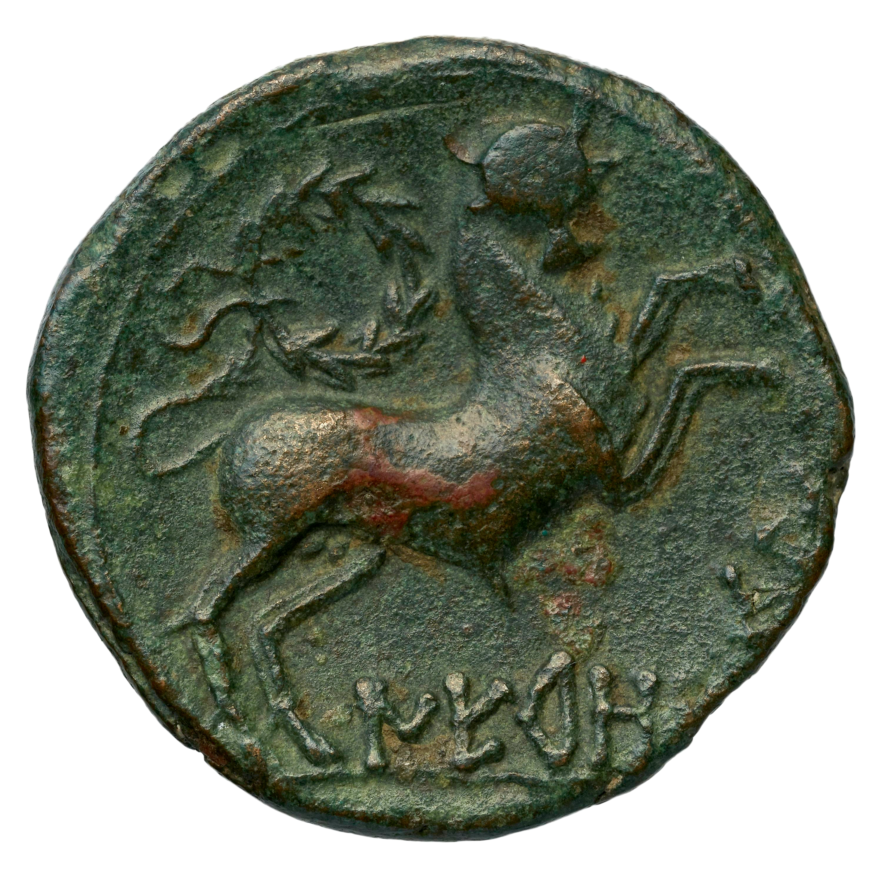 Bronze des Elesyces ou Neronken de Montlaurès. Revers : Cheval cabré à droite., au dessus une couronne de laurier, en dessous une inscription NERONKEN en caractères ibériques. Bronze, 12,91 gr. Diamètre environ 25,5 mm. vers -150. Collection Bnf : 2451 (Ancien fonds) (GAU-2504)